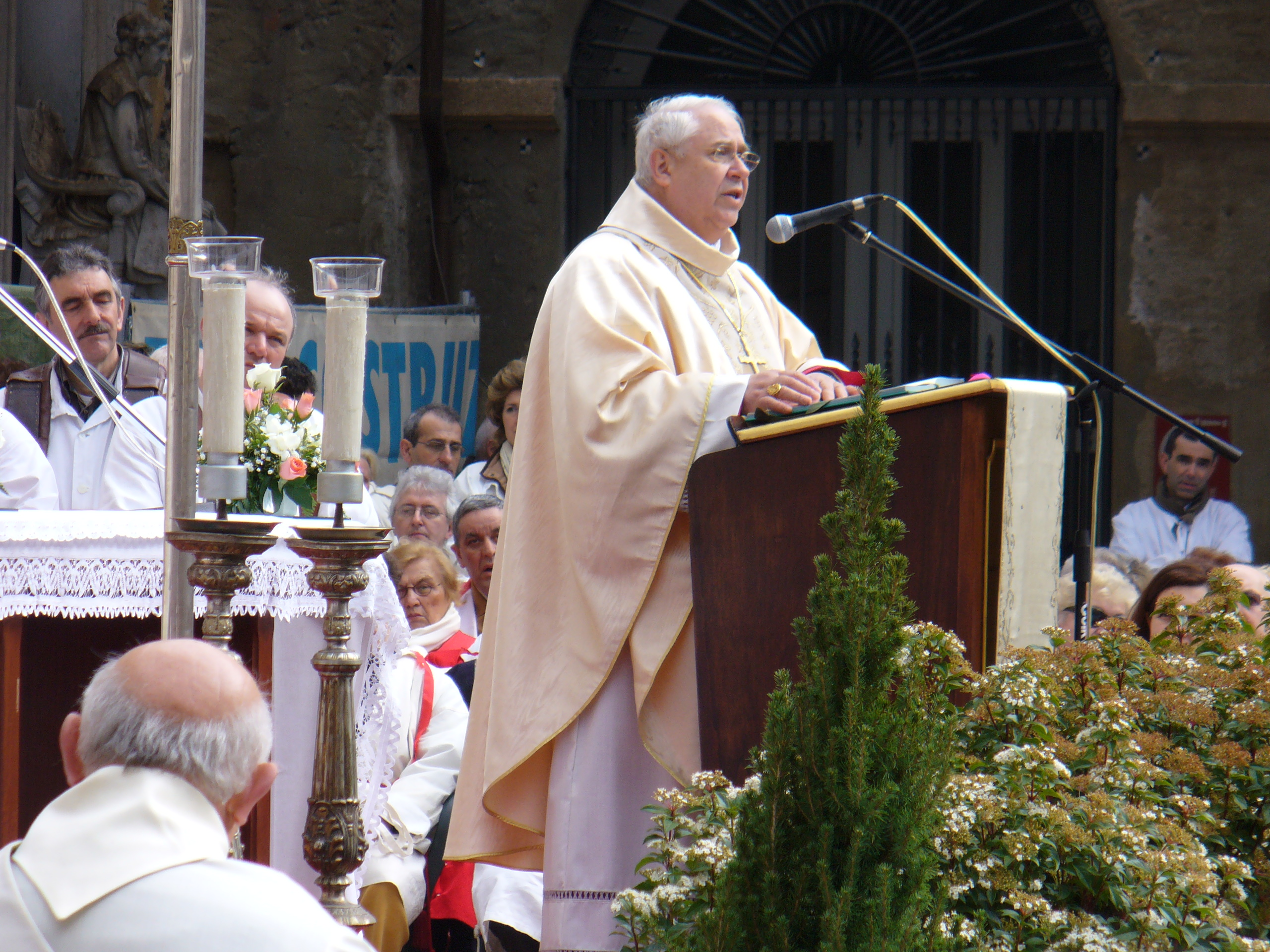 Cardinale Domenico Calcagno, Presidente dell’Amministrazione del Patrimonio della Sede Apostolica e Arcivescovo-Vescovo Emerito della Diocesi di Savona-Noli.